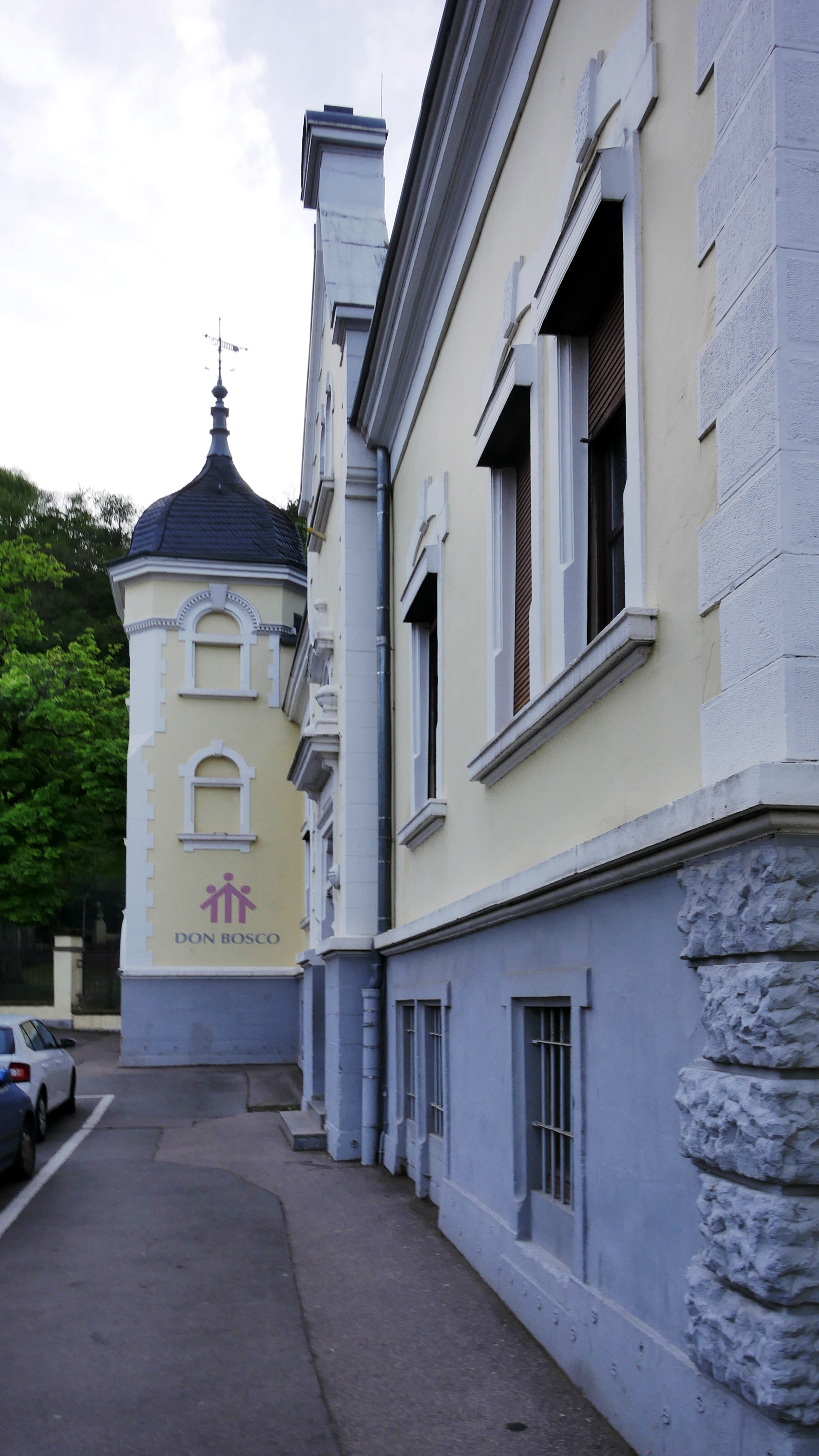 Gneisenau Kaserne (Städtische Kaserne) Trier. Linkes Gebäude an der Gneisenaustraße, ehemaliges Offizierskasino, heute Don Bosco Haus